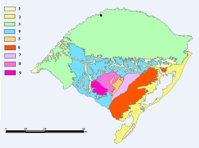 Localização de Crissiumal no Planalto Norte-riograndense.